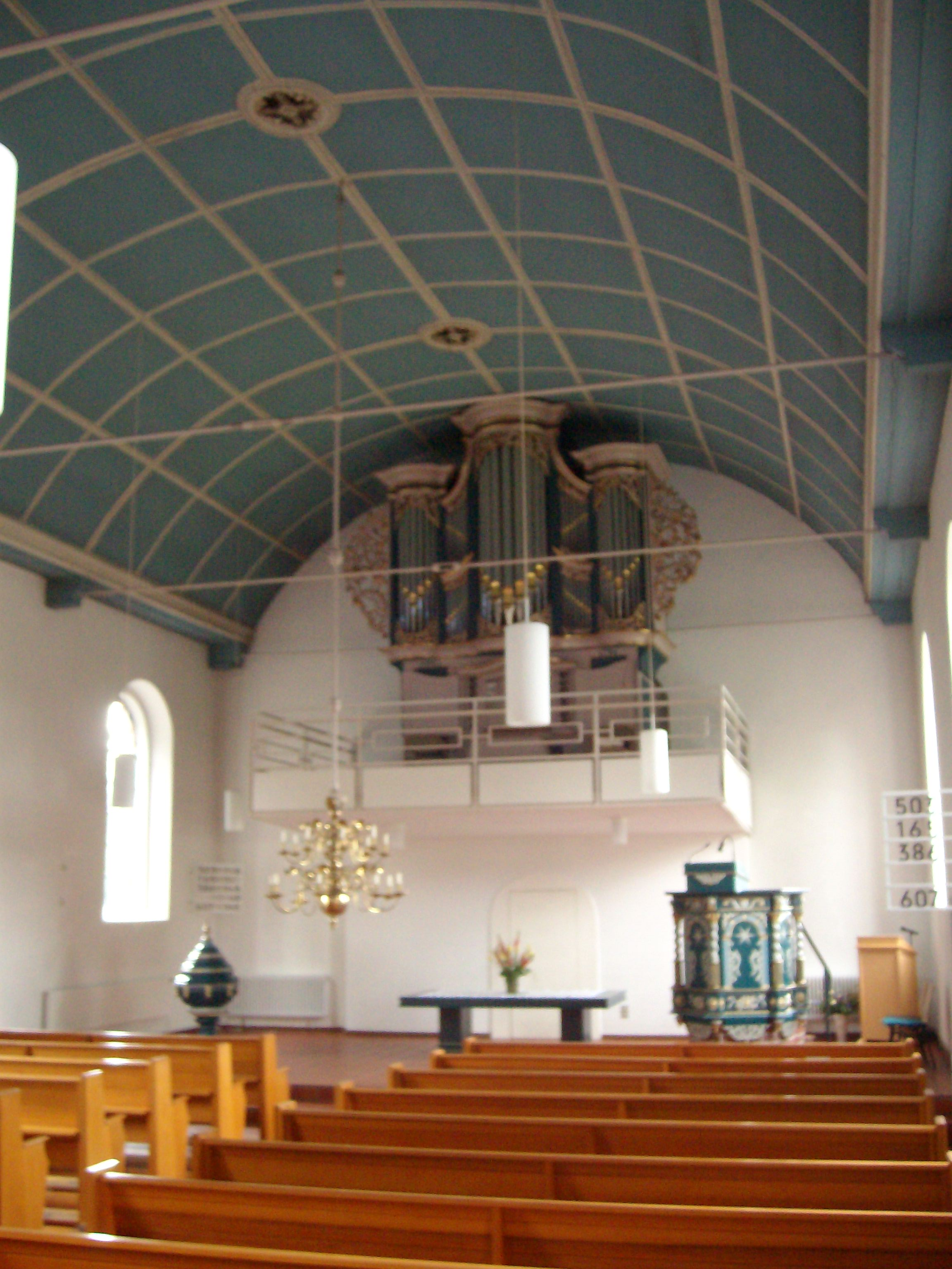 Innenraum Reformierte Kirche in Neermoor